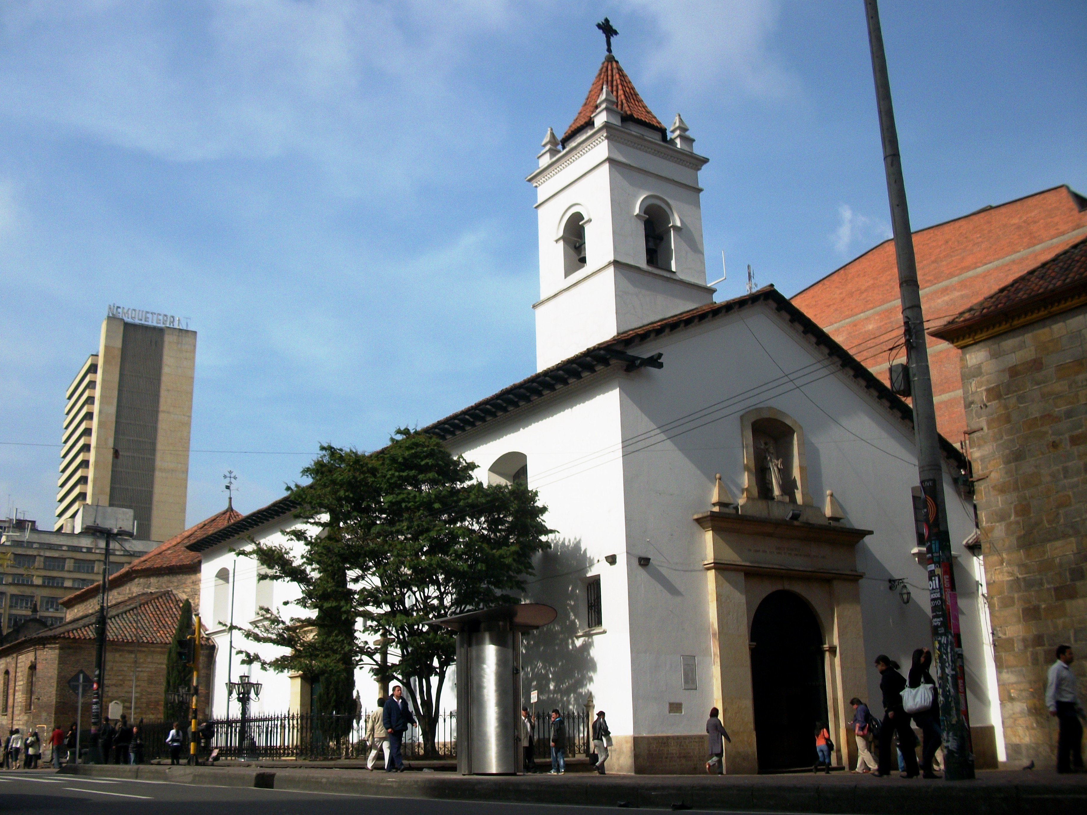 Iglesia de la Veracruz, en la cra 7 con clle 16 en Bogotá. Barrio Veracruz.